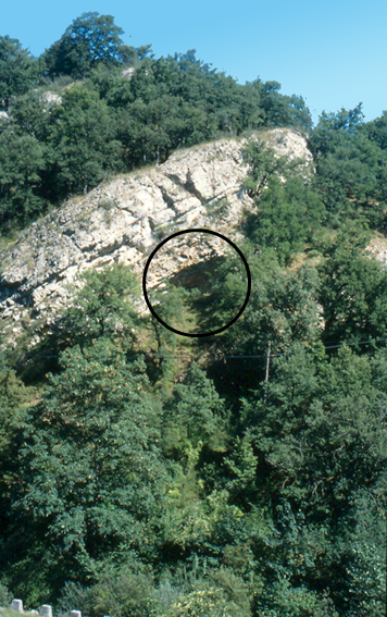 Yacimiento arqueoógico